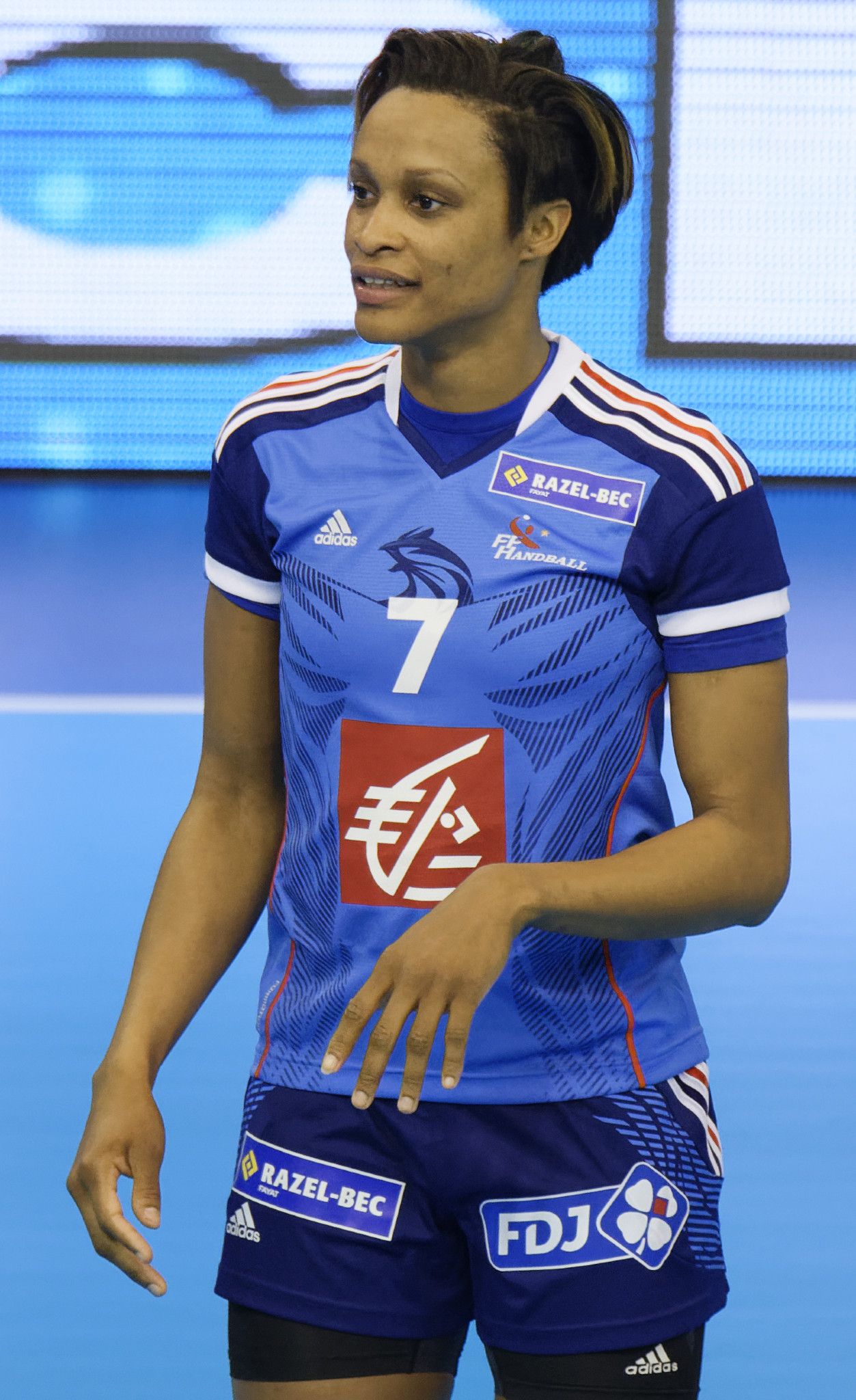 Rencontre entre la France et le Danemark lors de la Golden League 2015. A Dijon, le 19 mars 2015.